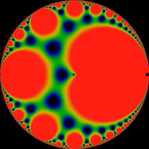 Klein's J-invariant, modulus portrait (600x600 pixels)